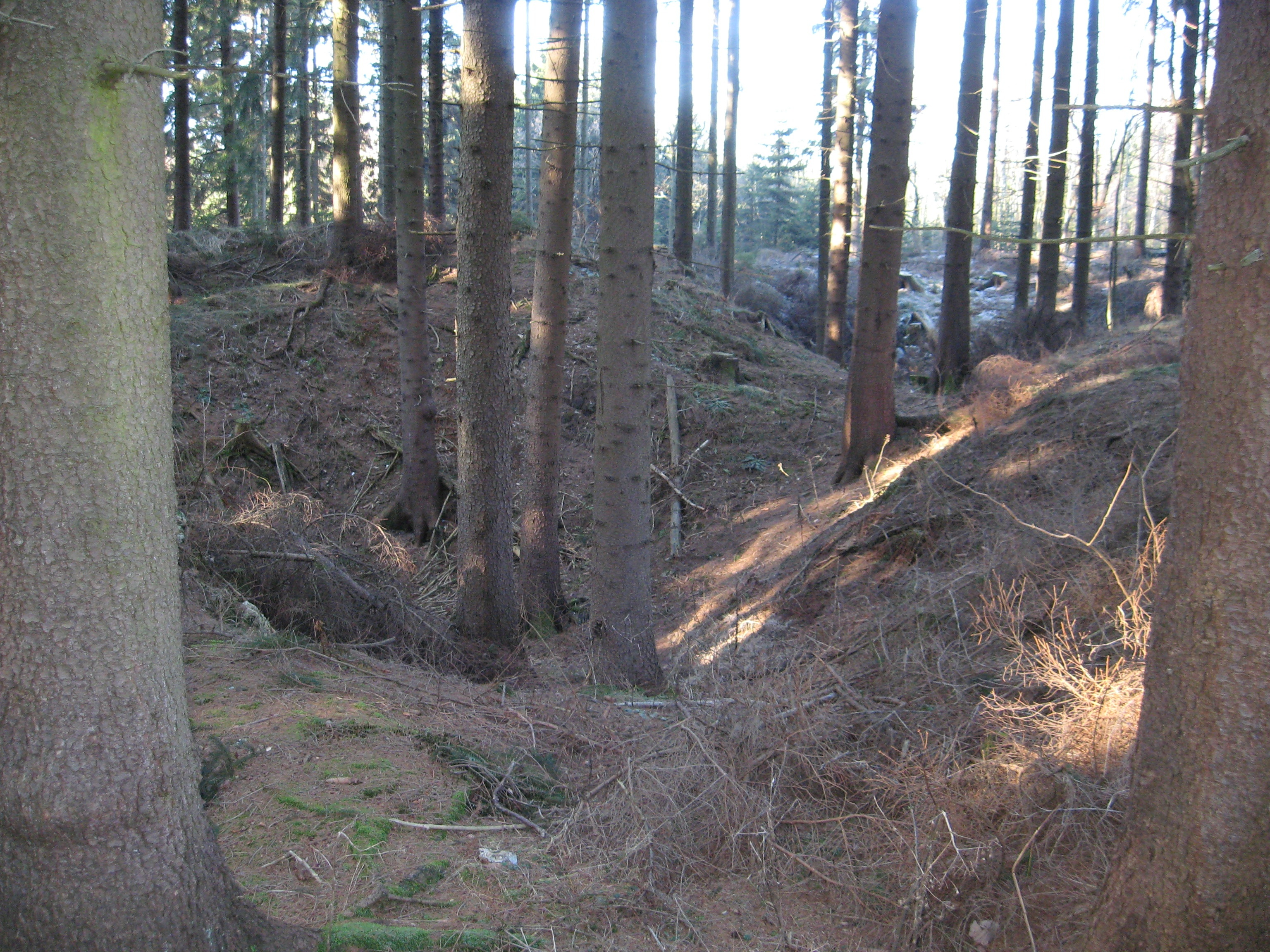 Alte Pingenzäge am Pfannenberg (zwischen Siegen und Neunkirchen, NRW) zeugen vom alten Bergbau im Siegerland.